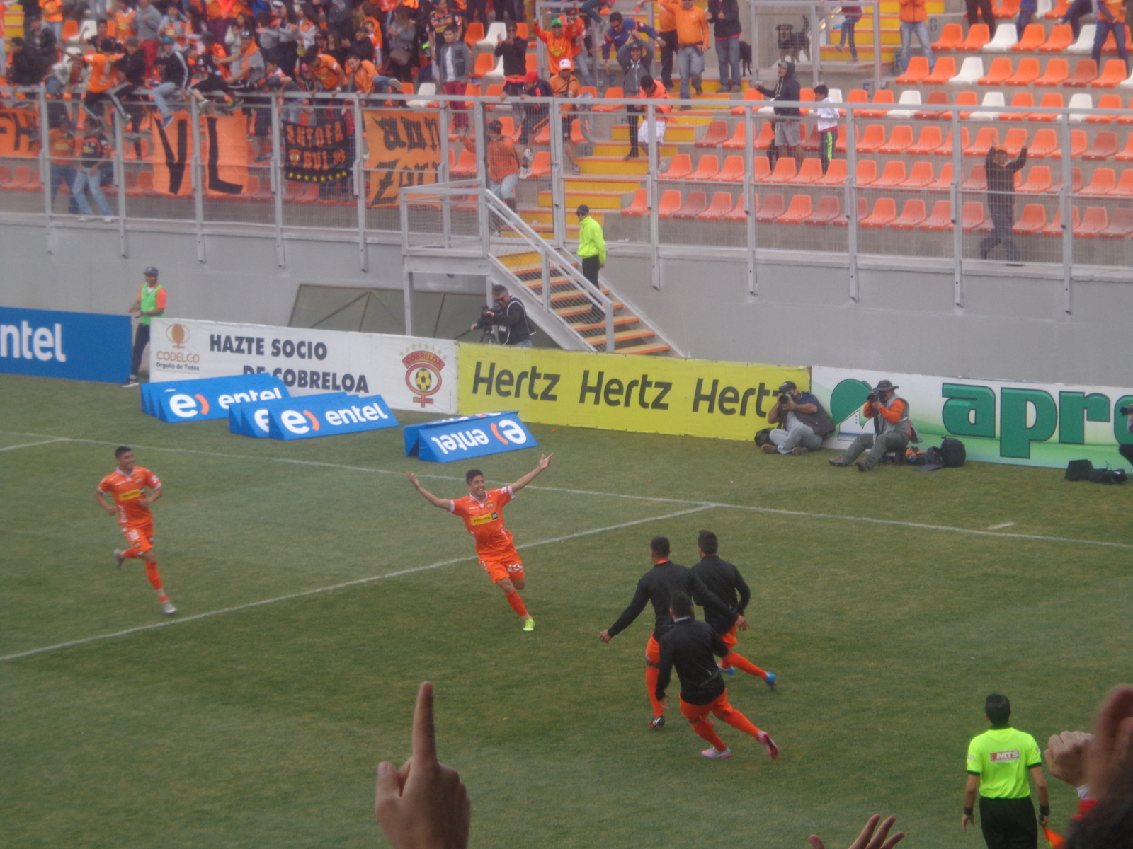 Fernando Cornejo Celebra un gol por Cobreloa